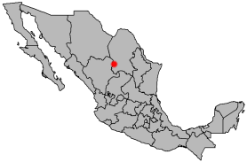 locatie van Torreón, zelf gemaakt